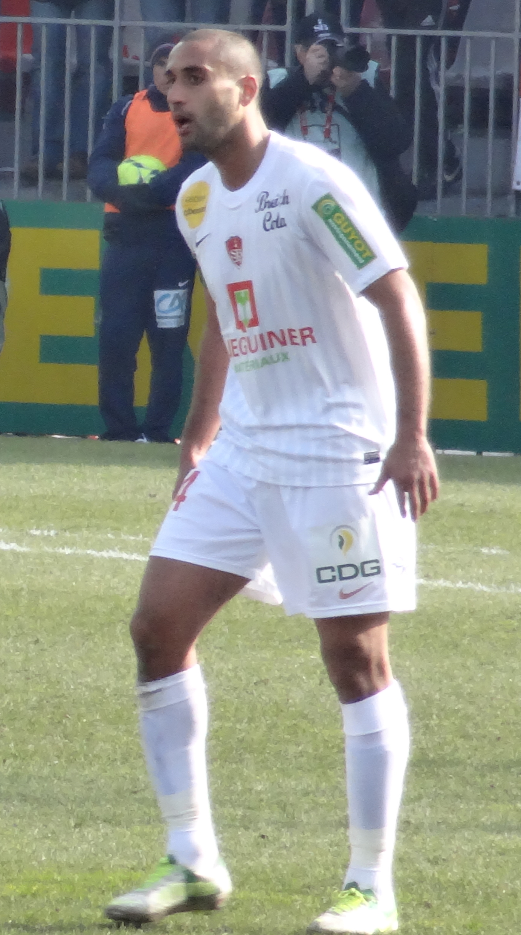 Match de football (Ligue 1) entre le Stade brestois 29 et l'Olympique lyonnais, le 3 mars 2013